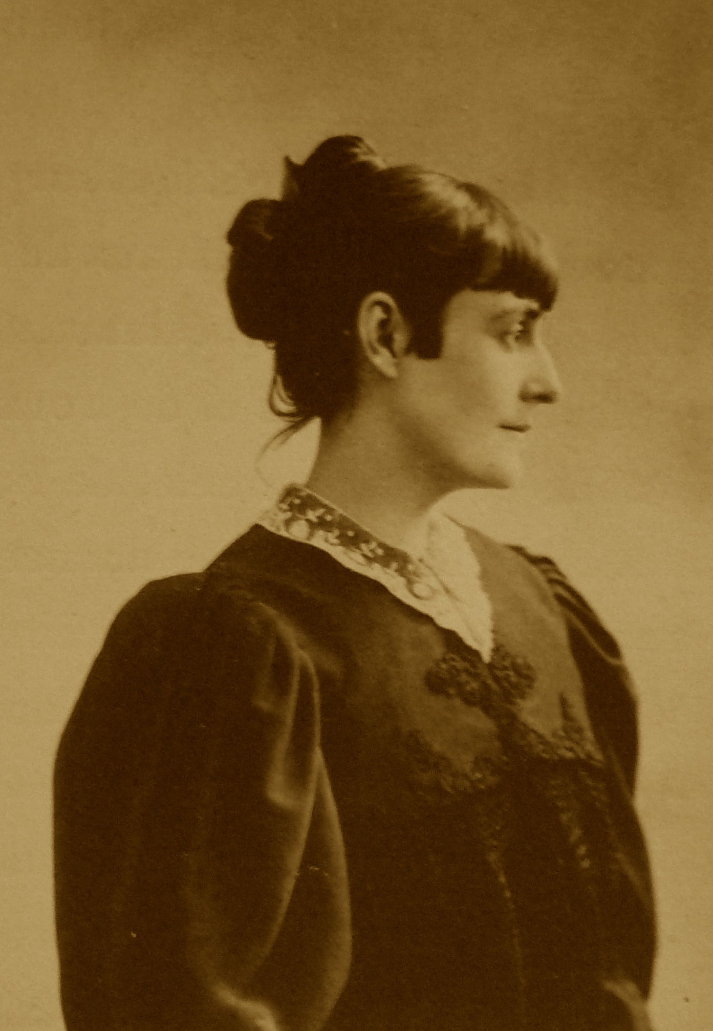 Portrait de Marie Duhem - Photographie - vers 1900